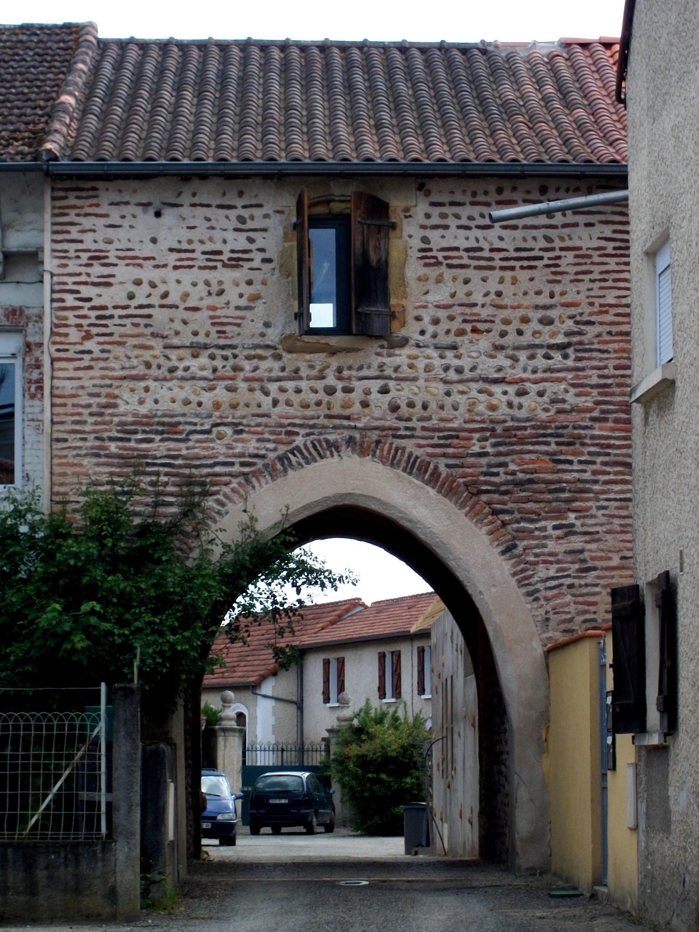 Porte à Villecomtal-sur-Arros (Gers, France)